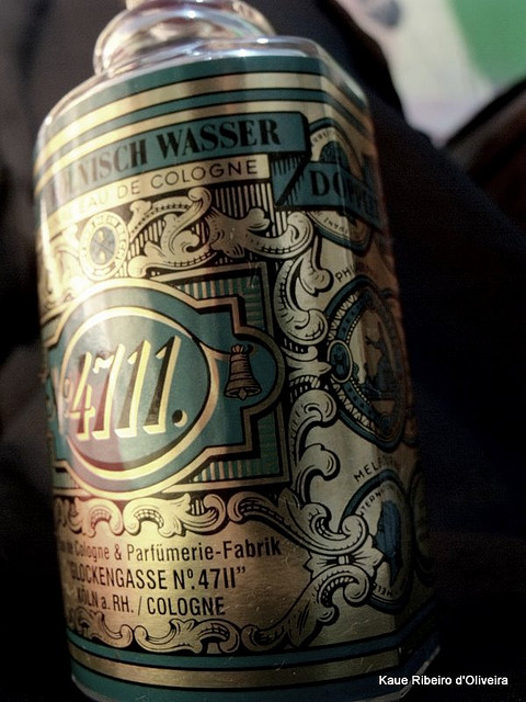 Por Kaue d'Oliveira